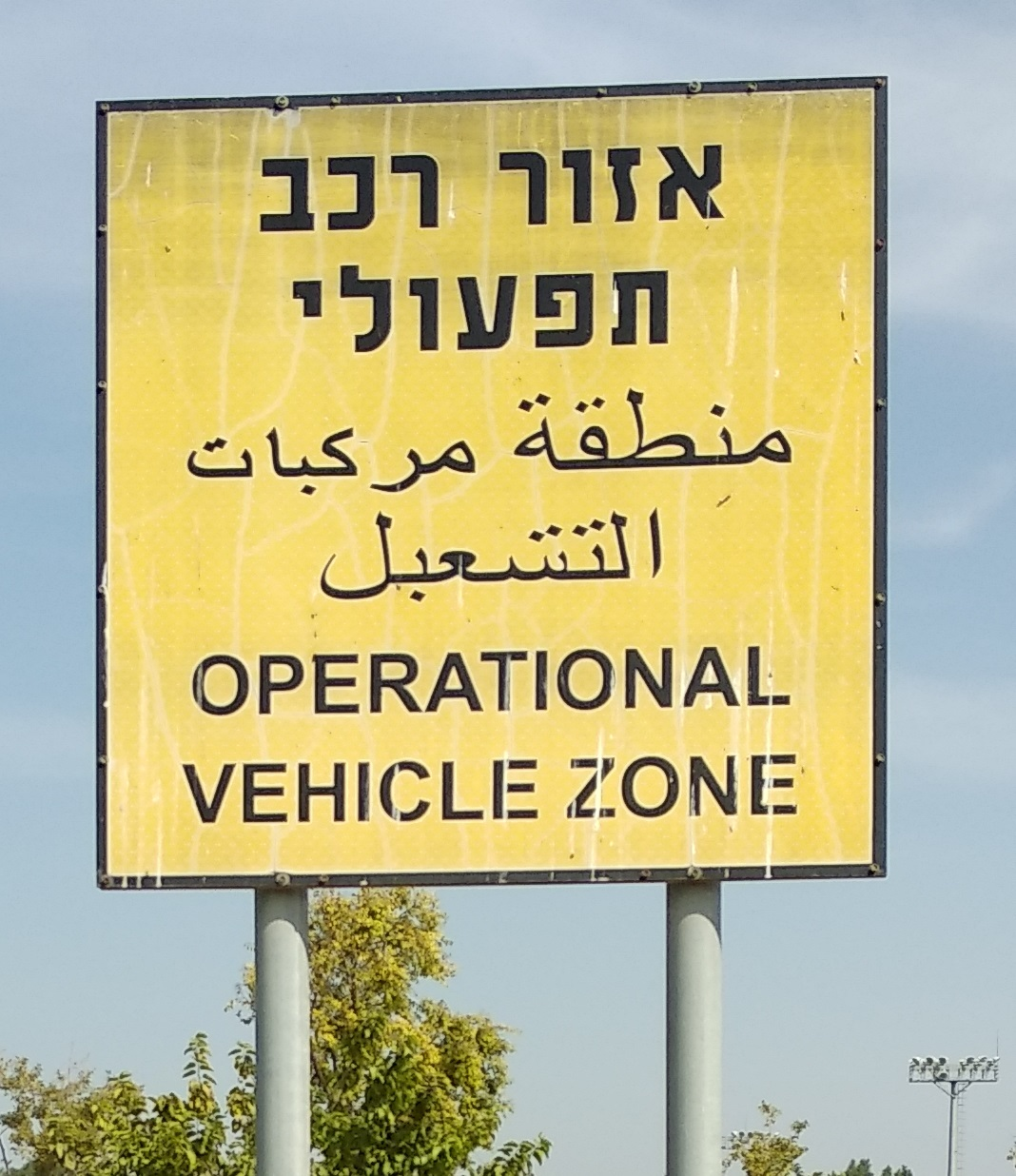 שלט אזור רכב תפעולי